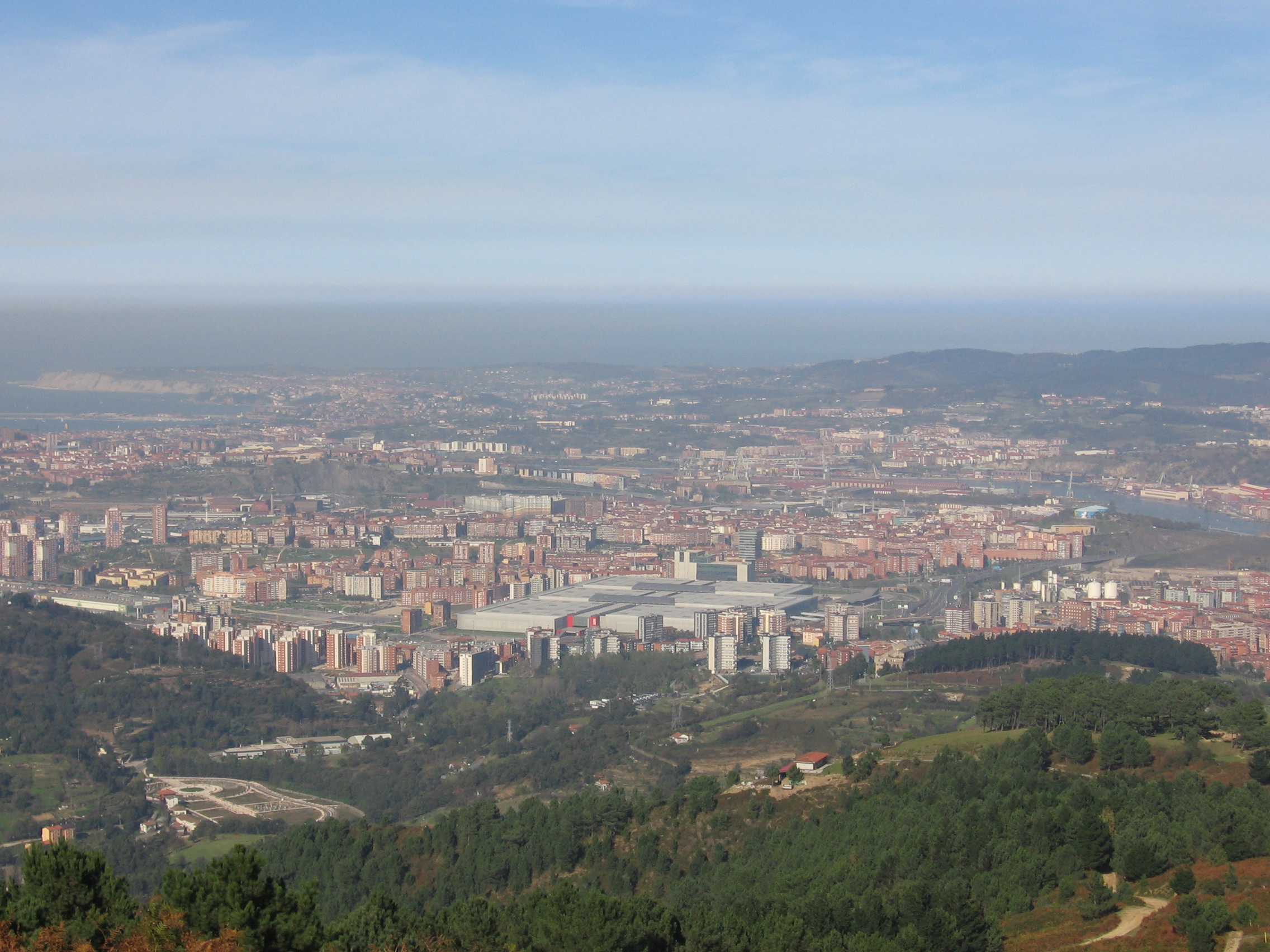 En la mitad inferior de la imagen, Barakaldo desde el monte Sasiburu. Detrás: Getxo (en la bahía a la izquierda), Leioa (en el centro) y Erandio (a la derecha sobre a la Ría)